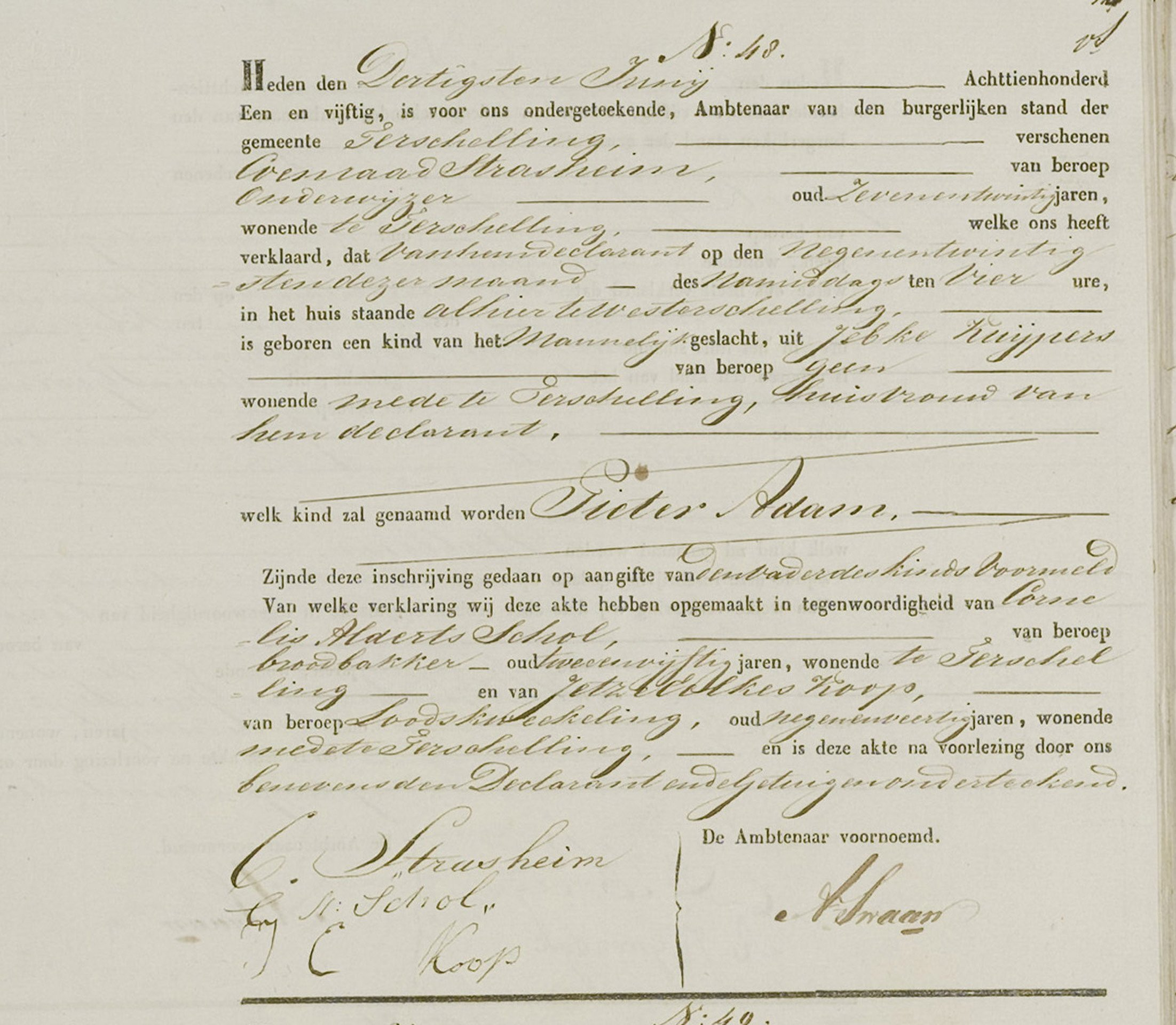 Geboorteacte Pieter Adam Strasheim